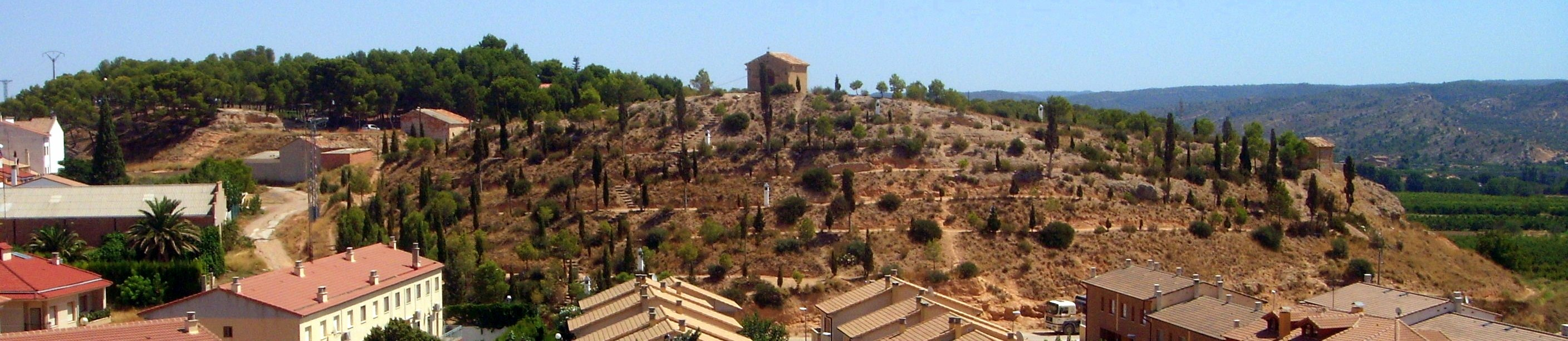 Vista general del Calvario de Calanda (Teruel)